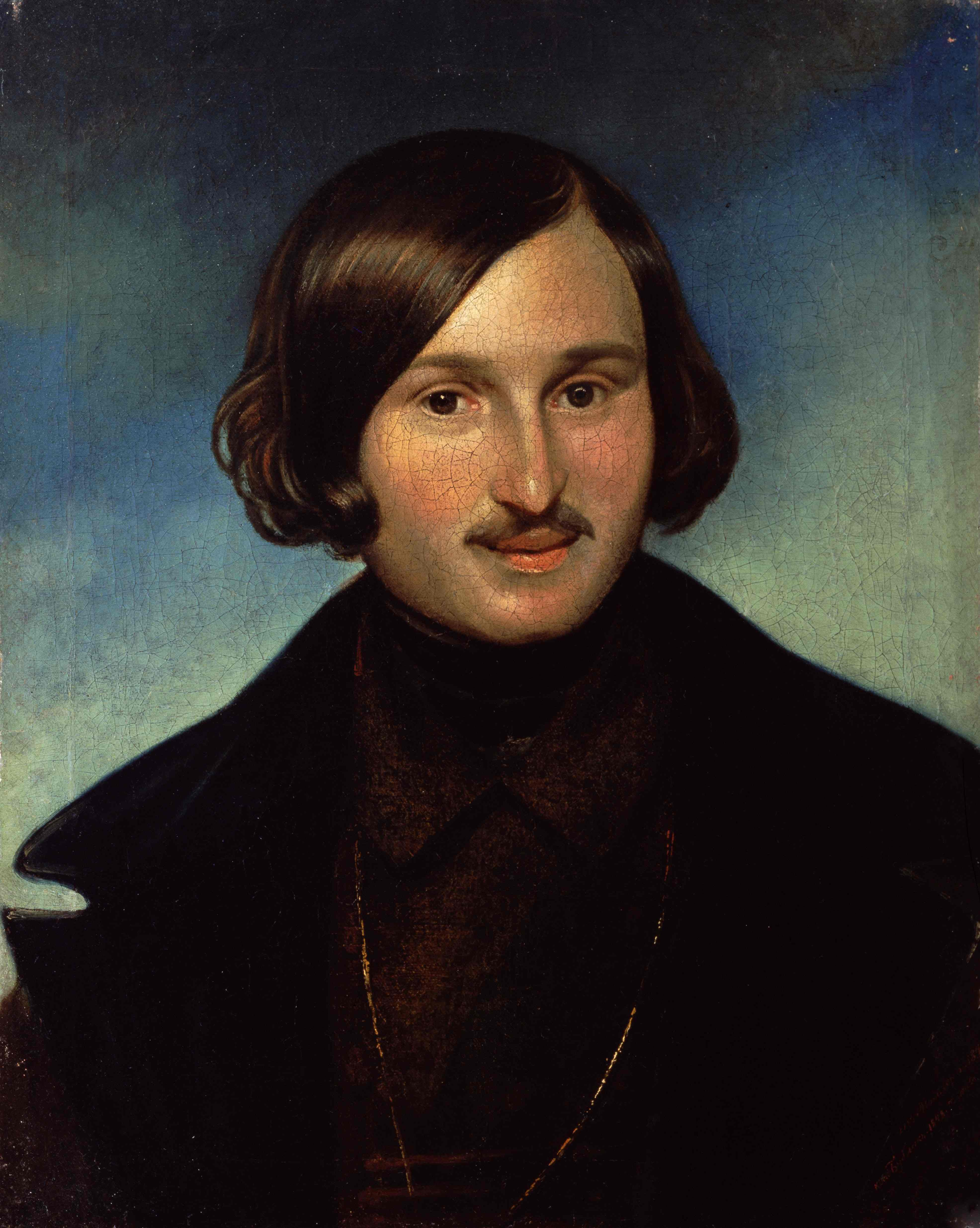 Федор Антонович Моллер (1812-1874). Портрет Н.В. Гоголя. 1848 год. Холст, масло. Литературный музей Пушкинского Дома Российской Академии наук, Санкт-Петербург